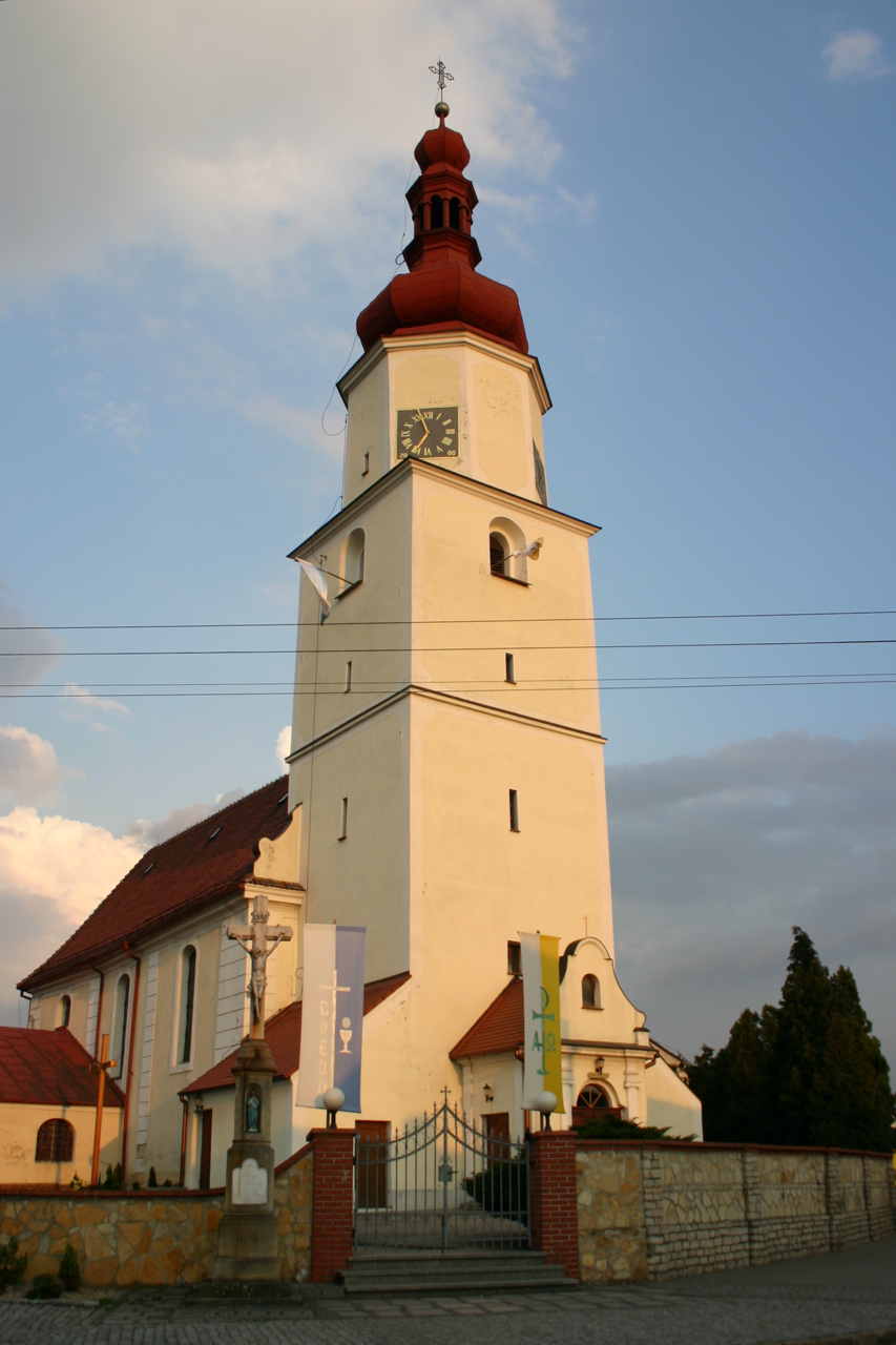 Parafia św. Marcina w Strzeleczkach.